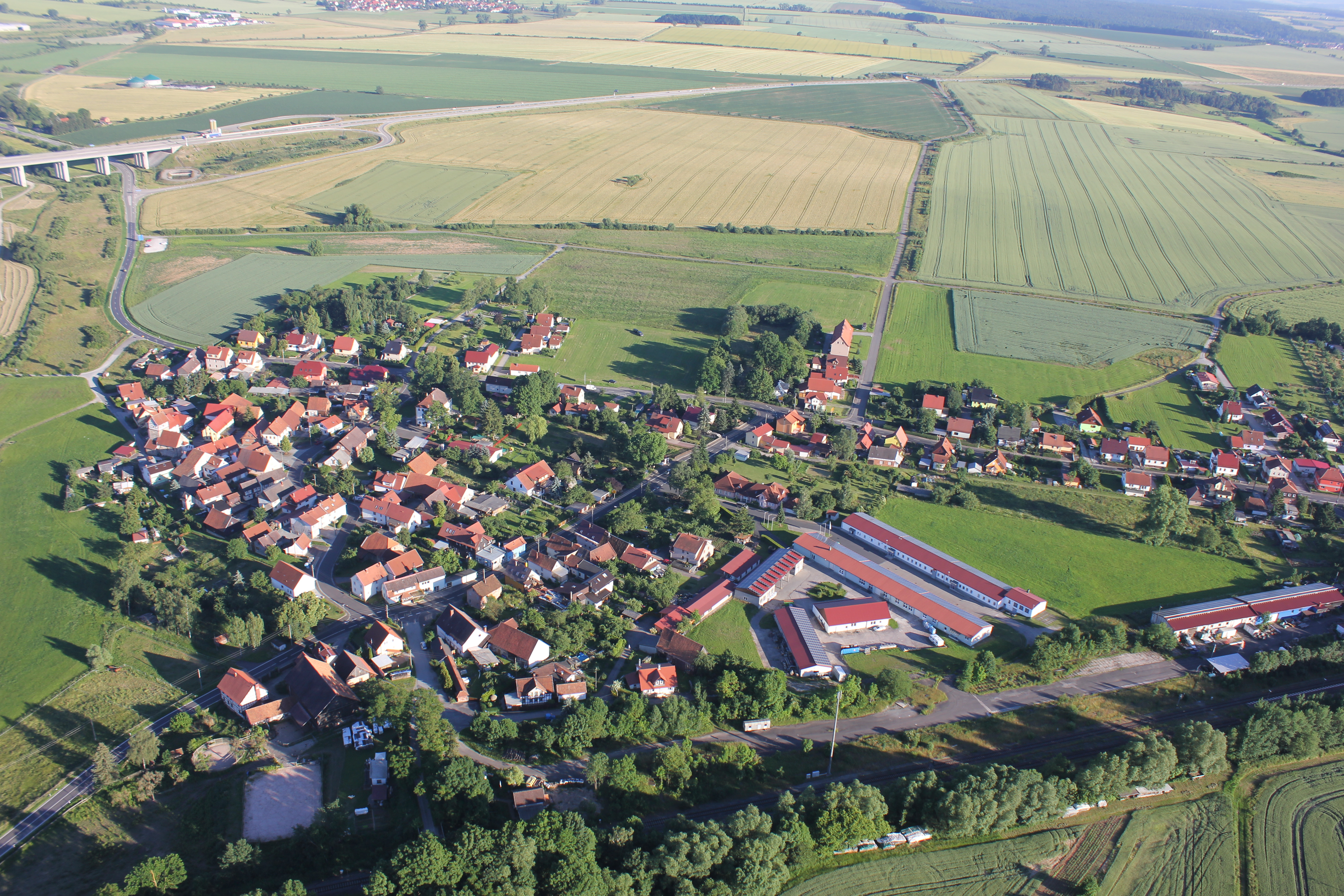 Ortskern Rentwertshausen mit Blick von einem Heißluftballon